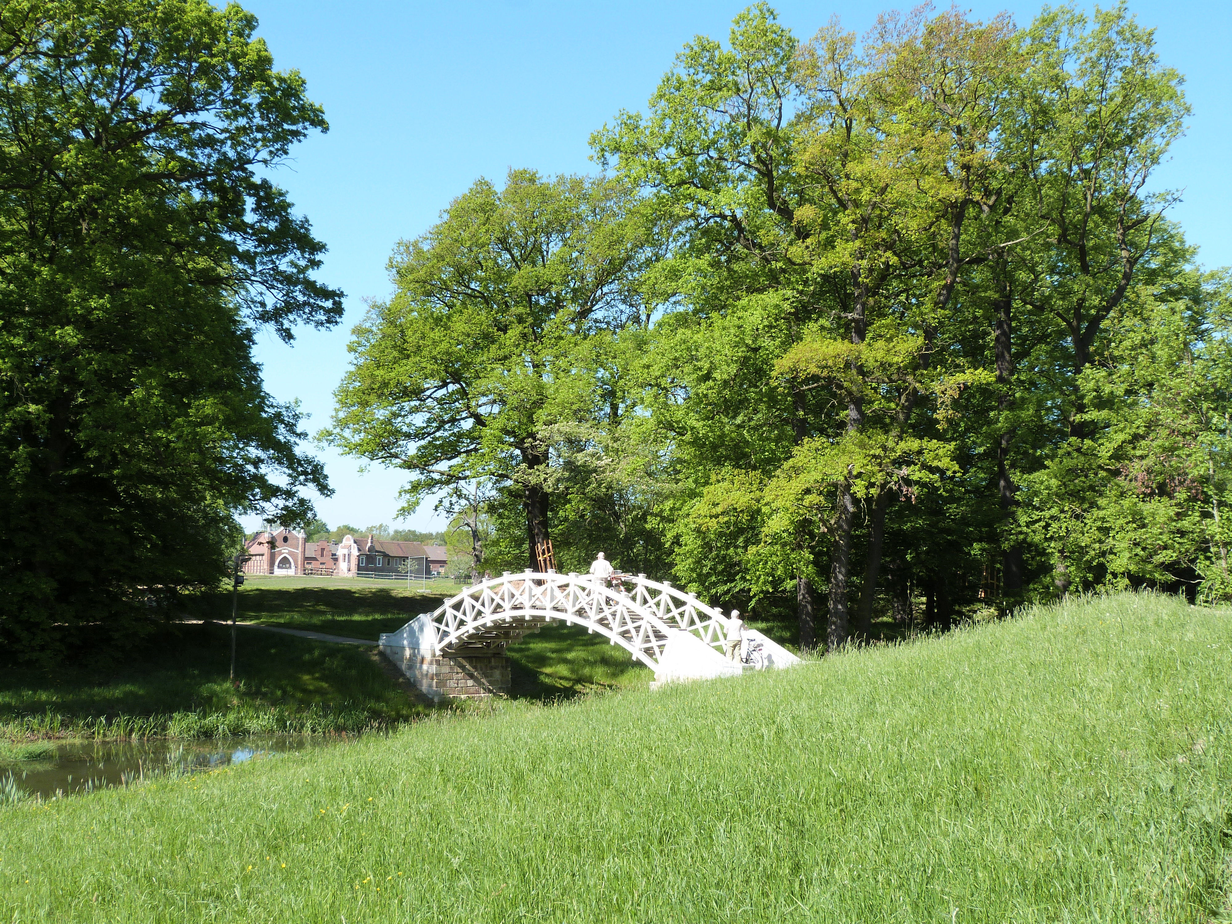 Park Luisium, Weiße Brücke mit Blick zum Gestüt, neu errichtet 2017, Dessau-Waldersee